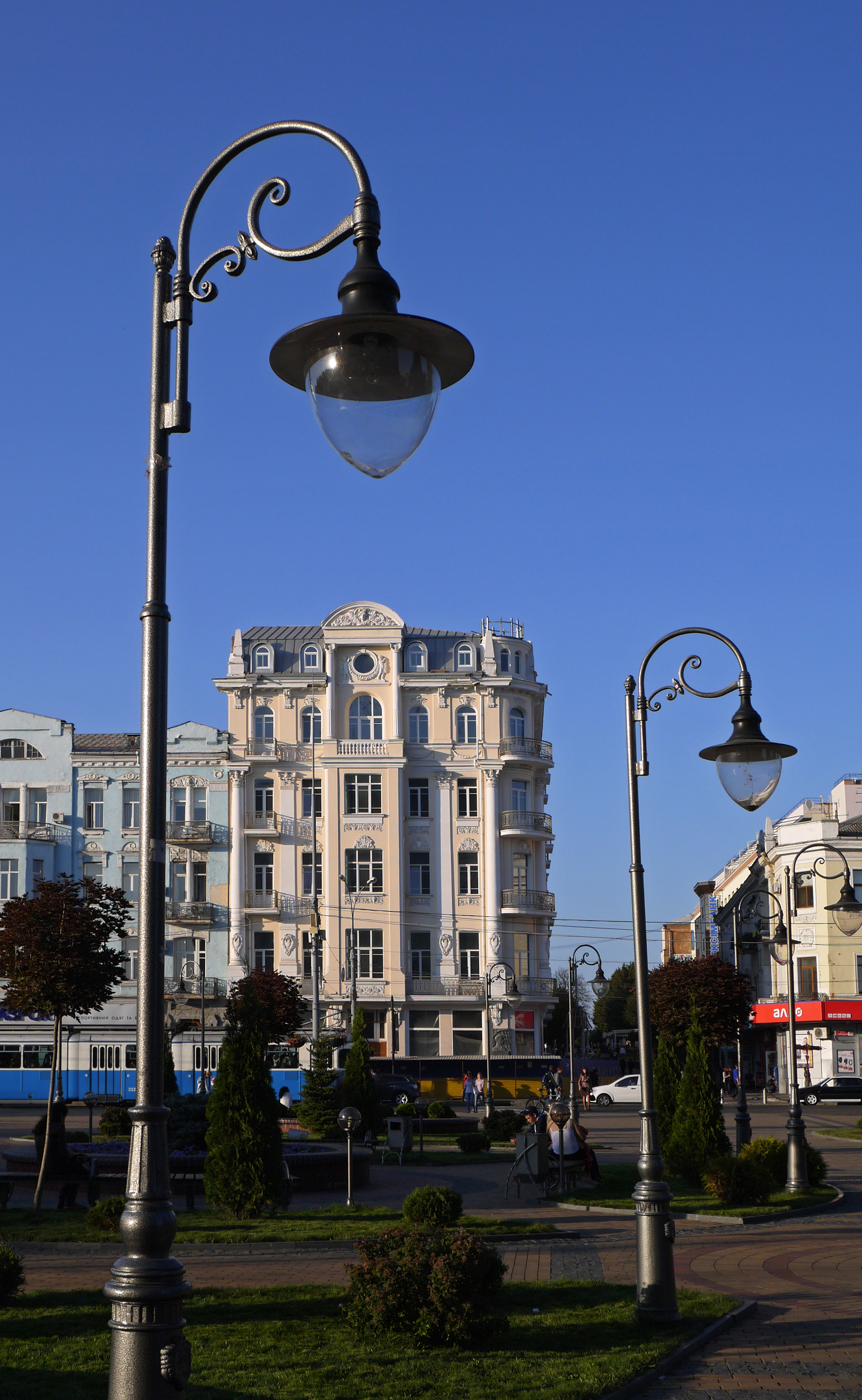 Готель «Савой», Вінниця, вул. Козицького, 36